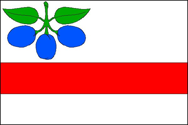 Vlajka obce Horní Slivno